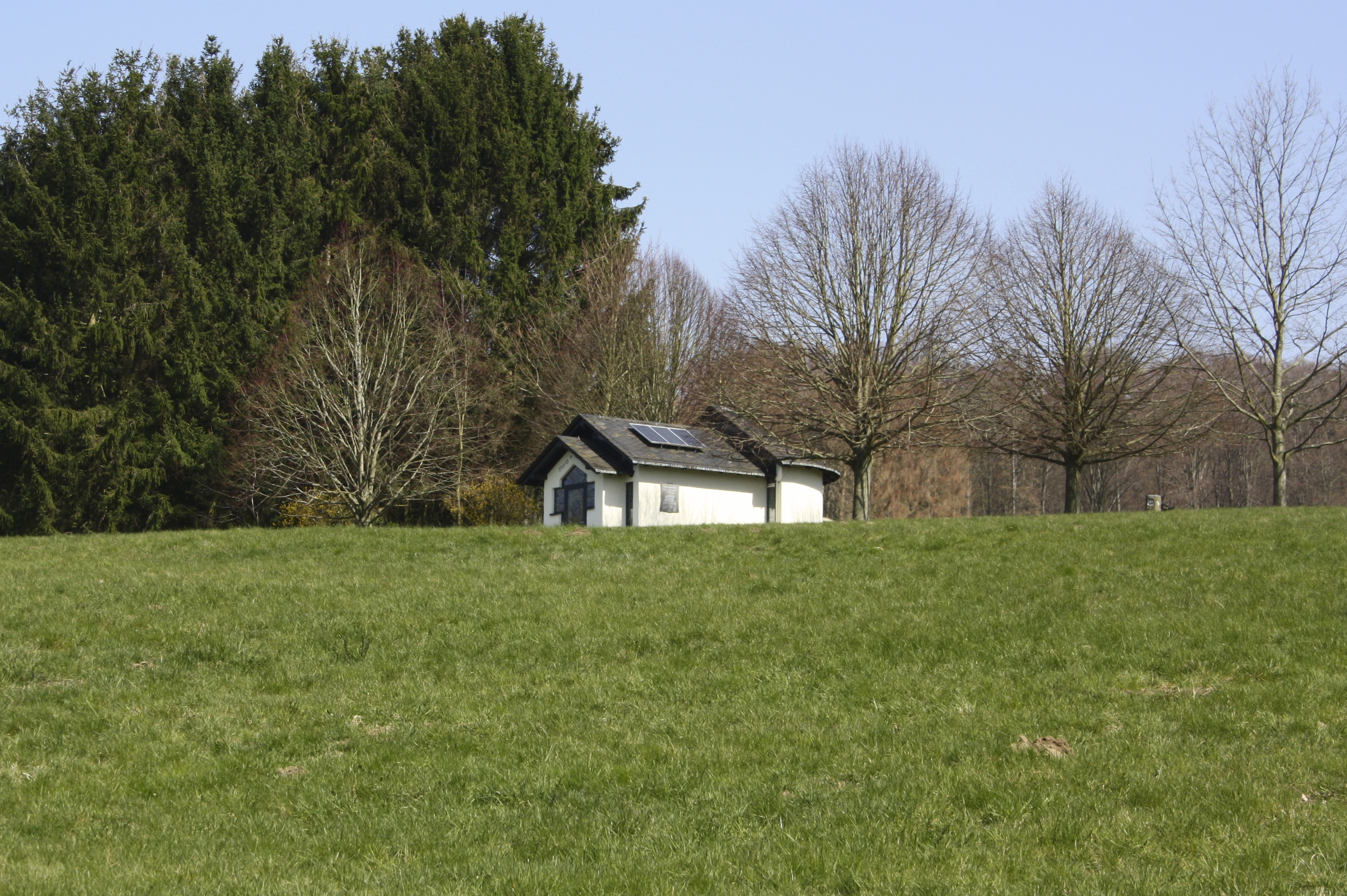 Kapelle Maria in der Augst, Kadenbach, Westerwaldkreis, Rheinland-Pfalz, Deutschland